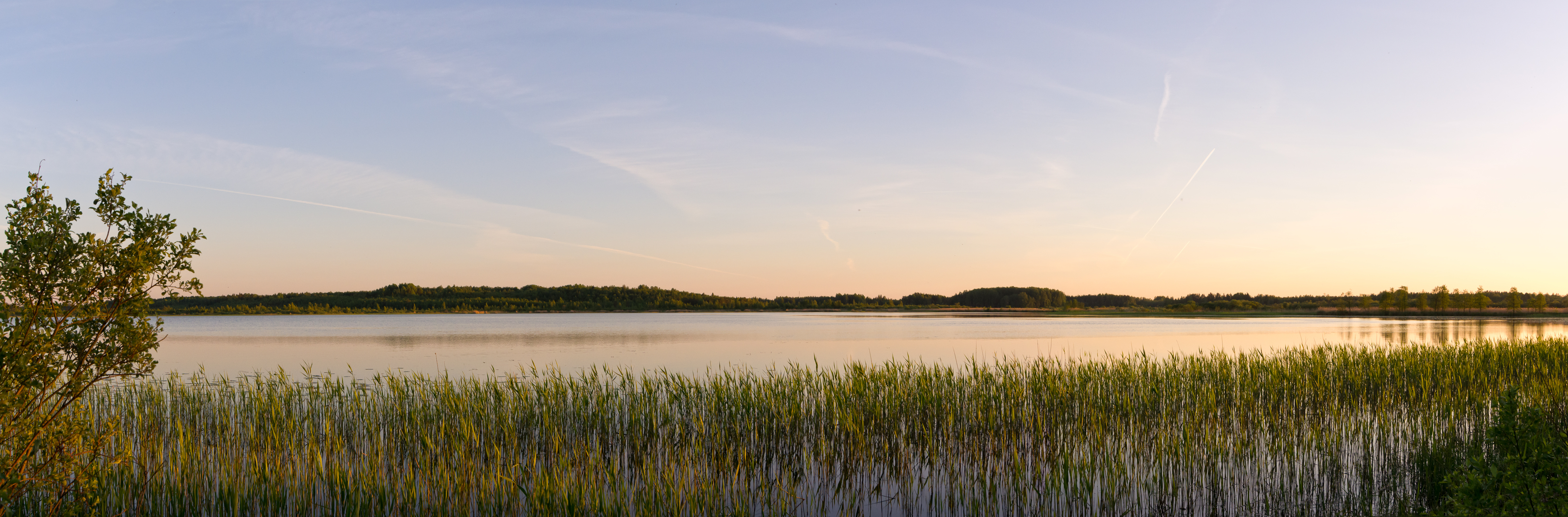 Kaiu järv. Panoraamvaade Pedassaarelt.